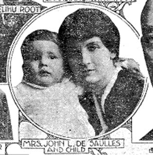 Blanca Errazuriz